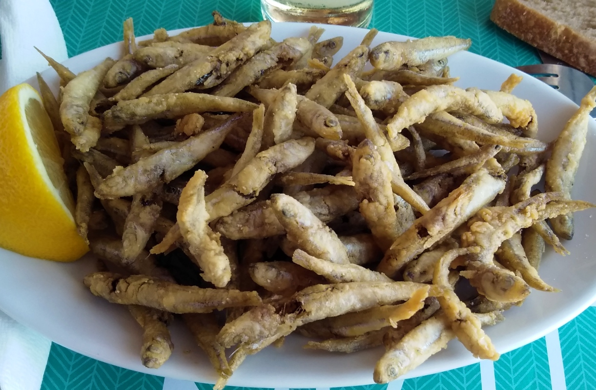 Un piatto di latterini in frittura